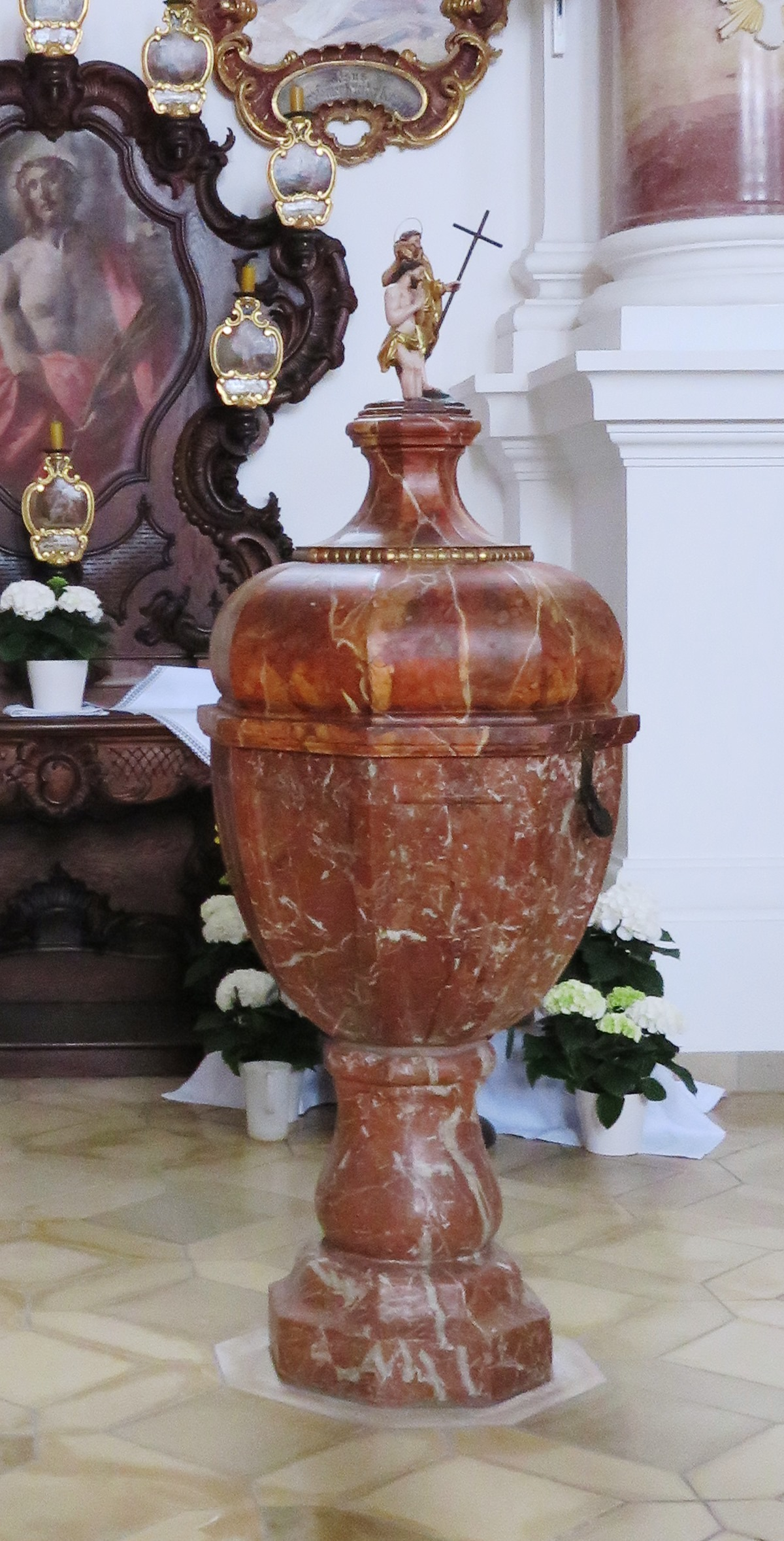 St. Andreas in Nesselwang